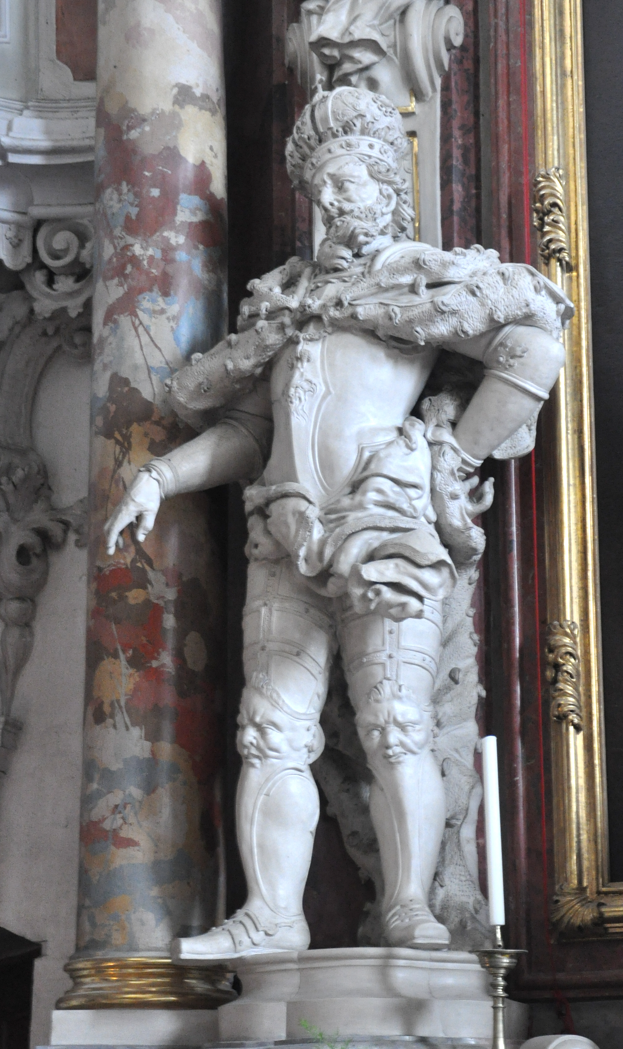 Klosterkirche Metten Nördlicher Seitenaltar, Figur des Kaisers Heraklius von Franz Josef Ignaz Holzinger, ca. 1722–1724